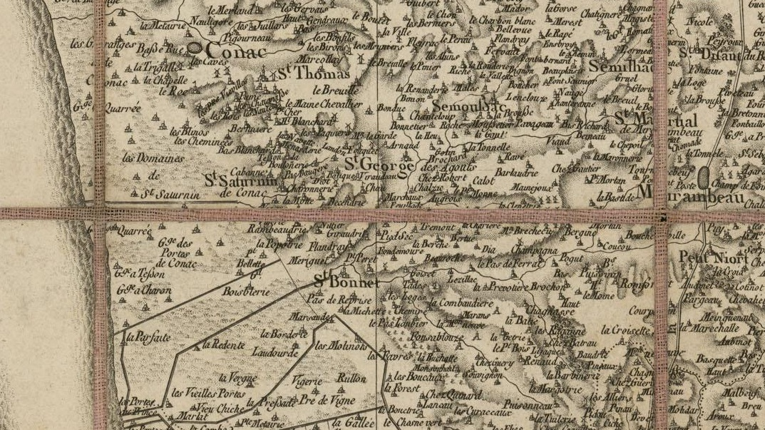 Carte de Cassini : extrait montrant la région de Mirambeau (Charente-Maritime) Libre de droits (carte publiée au XVIIIe siècle)